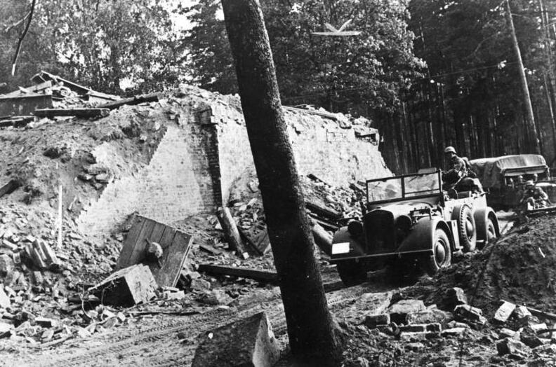 Polen, deutsche Truppen neben Ruine Unaufhaltsam geht der deutsche Vormarsch trotz Sprengungen der Polen weiter. Die Polen haben bei ihrem Rückzug die Eisenbahnüberführung der Linie bei Tarnowitz gesprengt. An den Brückenüberresten aber zogen kurz nach der Sprengung bereits die motorisierten Truppen der Wehrmacht in ihrem Vormarsch vorbei. FR OKW 5.9.39 beu-me-schm Presse Hoffmann 11482-39 [Polen.- Motorisierte deutsche Truppen (mit unkenntlich gemachten Kfz-Kennzeichen) bei Vorbeifahrt an Ruine einer Eisenbahnüberführung]